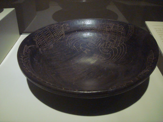 Cerámica negra con figura estilizada de un cangrejo, proveniente de la isla de Chira (Puntarenas). Museo del Oro Precolombino. San José de Costa Rica.